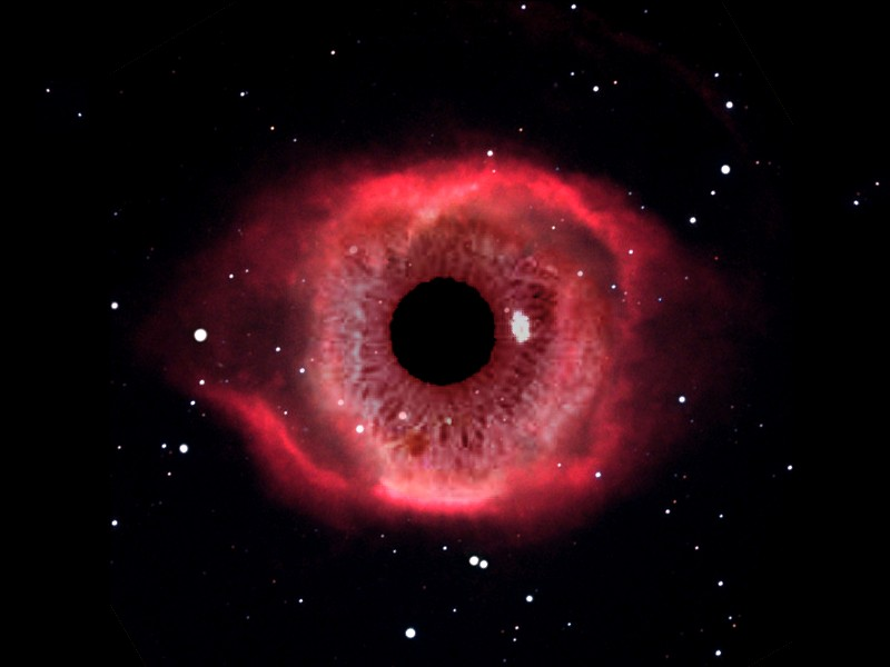 General: Auge in Sternennebel Specific: Kollage aus Iris und Helixnebel NGC 7293 Uploaded by: Benutzer:C.Löser History: (Löschen) (Aktuell) 13:33, 17. Mär 2005 . . C.Löser . . 800x600 (46480 Byte) (Collage aus Iris und Helixnebel NGC 7293) Other versions: File:Collage.jpg, File:Collage3.jpg